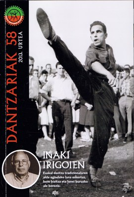 Iñaki Irigoien omenez Dantzariak aldizkariak atera zuen 58. ale bereziko azala.